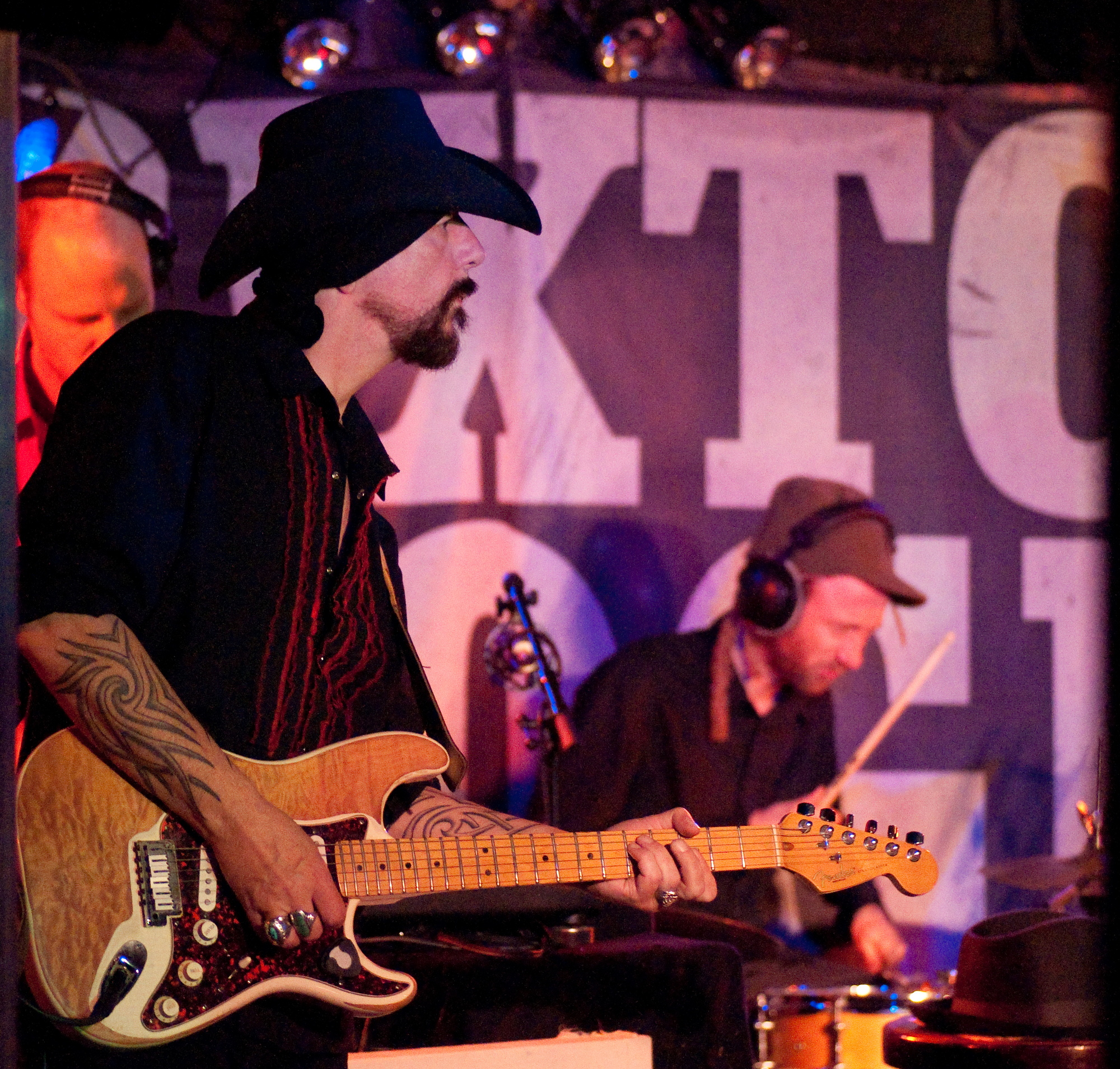 Brixtonboogie (Van Wolfen, DJ Suro (fast verdeckt) and Michi Pahlich) live im Quasimodo in Berlin am 30.04.2010